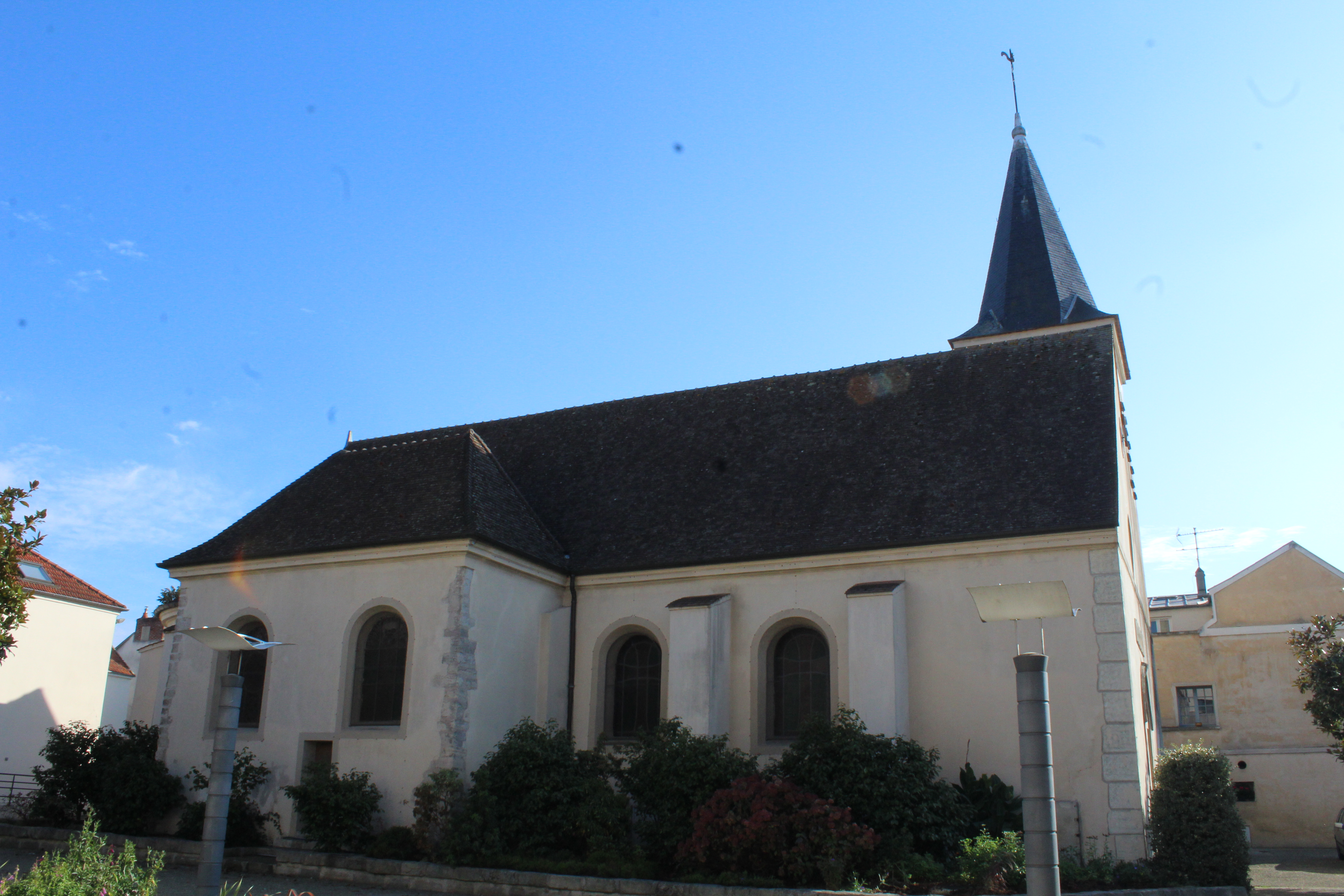 Église Saint-Loup de Champs-sur-Marne.